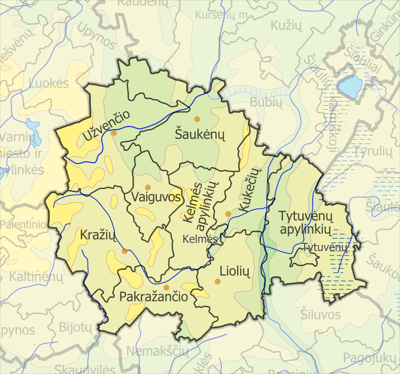 Kelmės rajono savivaldybės seniūnijos (lt::image:LietuvosSeniunijos.png)